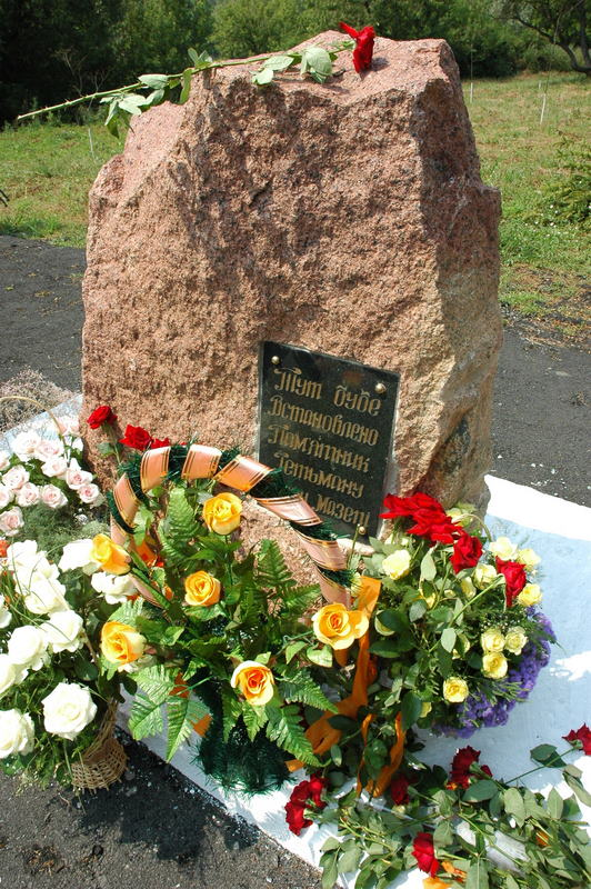 Памятный камень на месте избрания Мазепы гетманом Украины